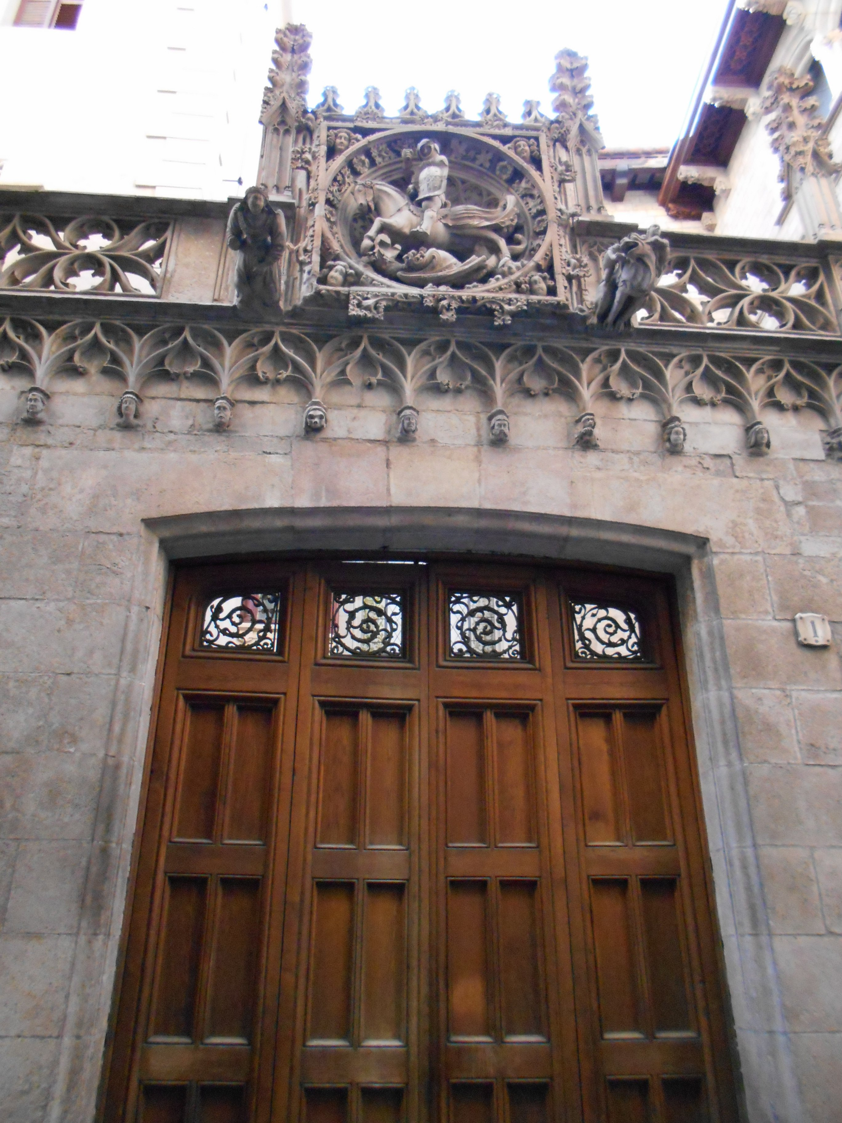 Palacio de la Generalitat de Cataluña, fachada gótica.